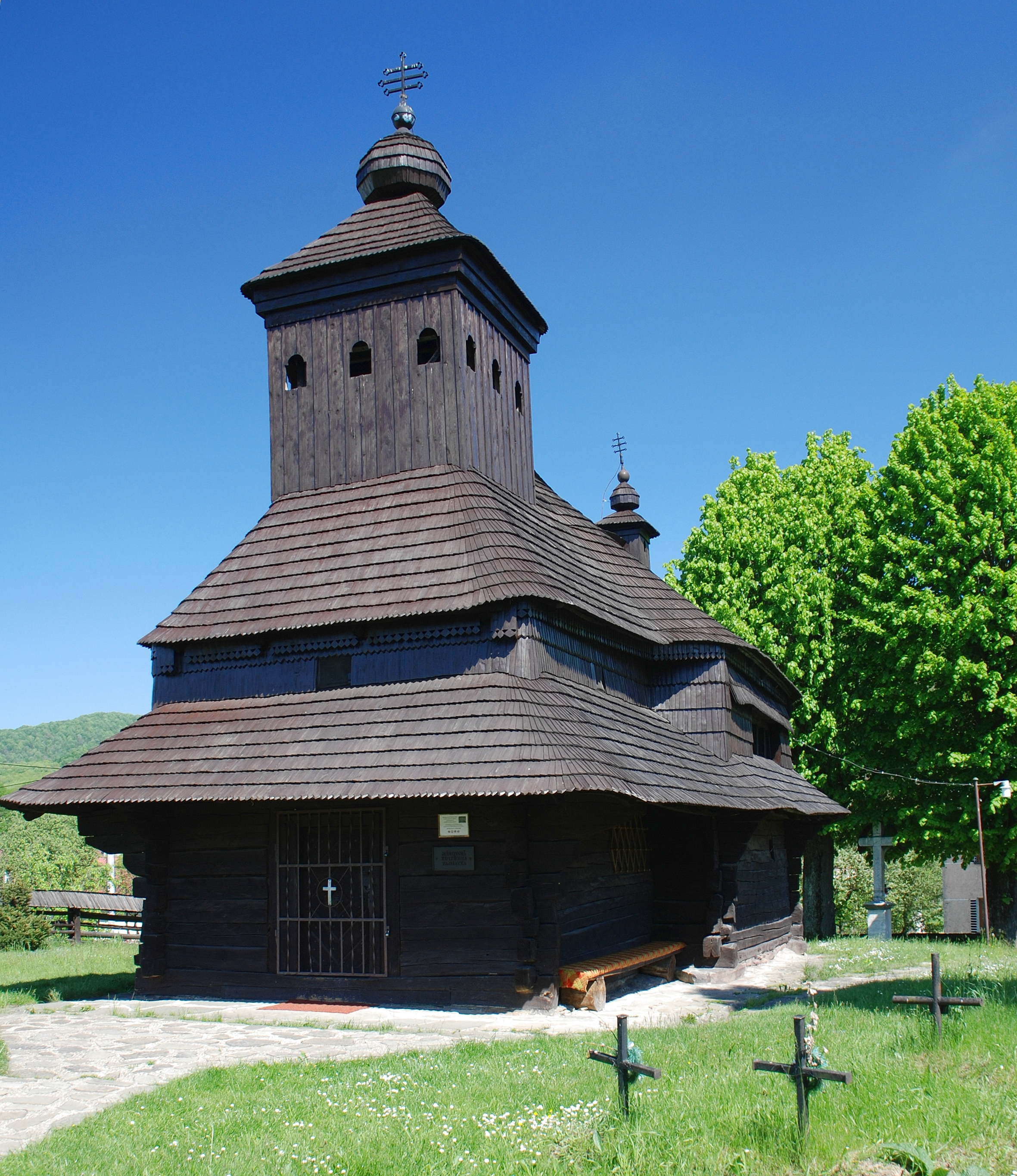 cerkiew